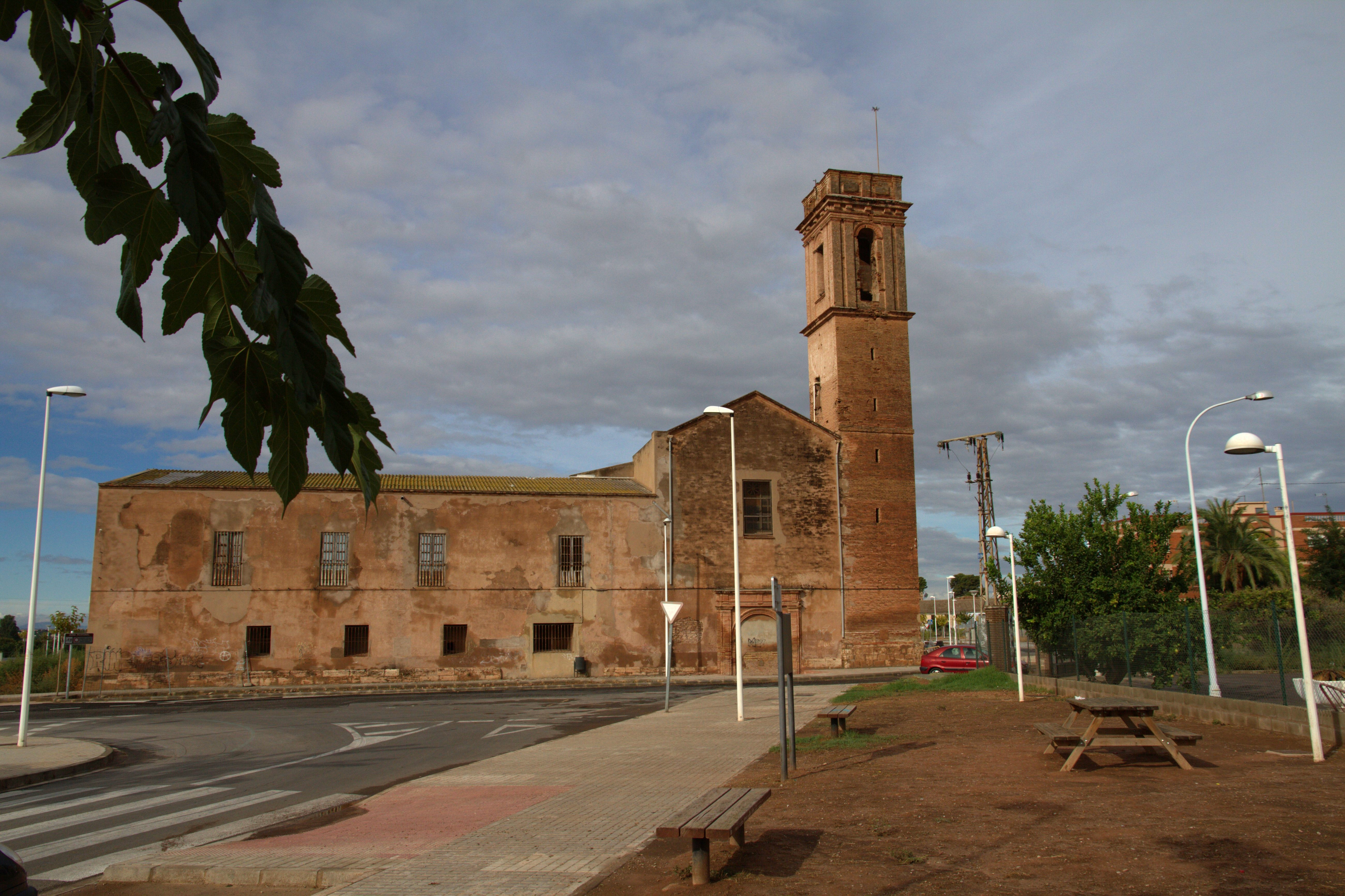 Restes de l'antic convent de Sant Dídac 13.025-012.